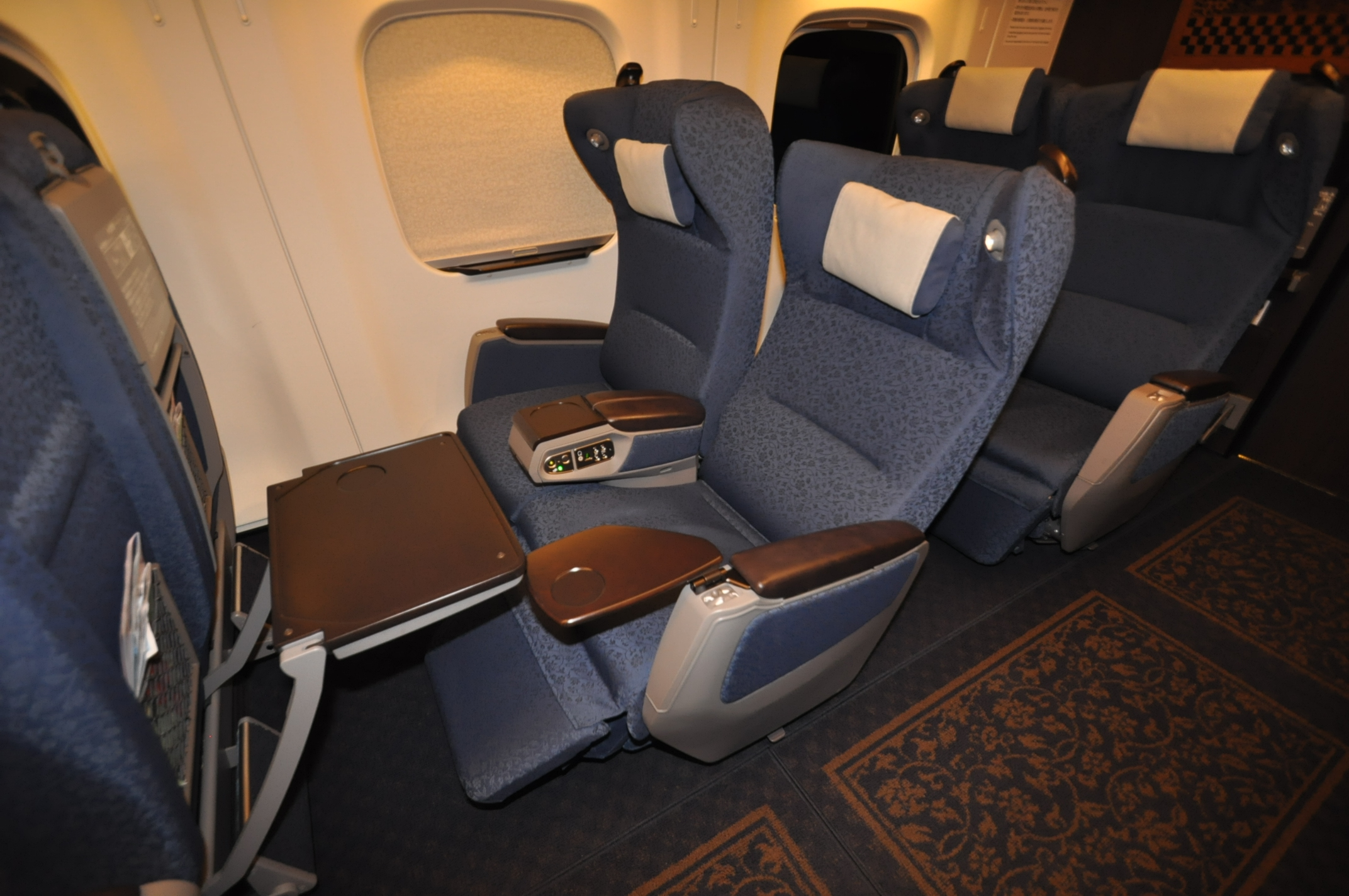 主に九州新幹線つばめ、さくら、みずほ号で使用されるＮ７００系７０００番台（８両編成）グリーン席